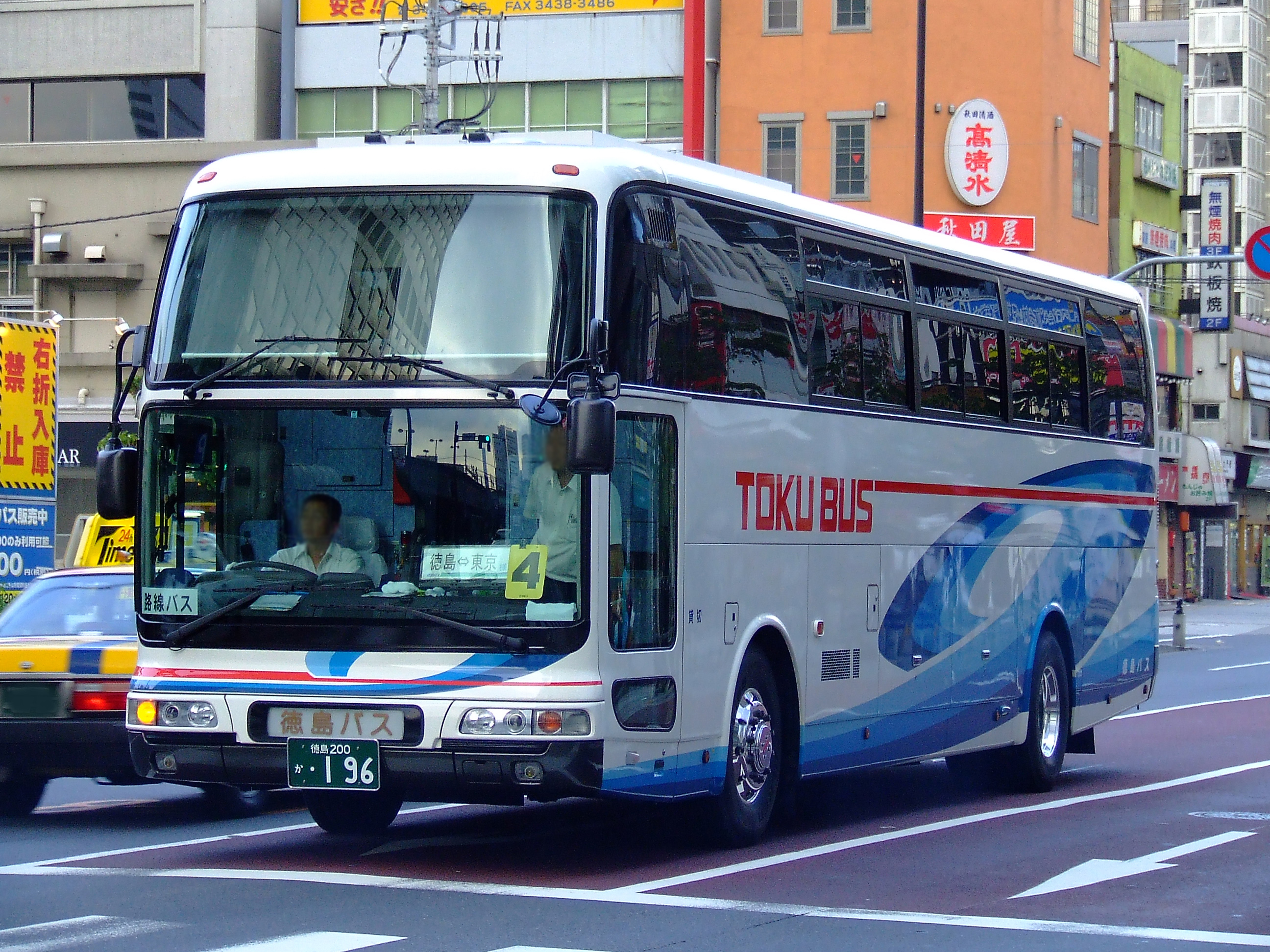 徳島バスの夜行高速バス「エディ号」（増車の観光バス車両）浜松町バスターミナル付近にて